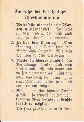 Deutschland - Baden-Würtemberg - Landkreis Biberach - Biberach an der Riß: Osterkommunion 1919 in der Stadtpfarrkirche (Rückseite mit "Vorsätzen bei der heiligen Osterkommunion")